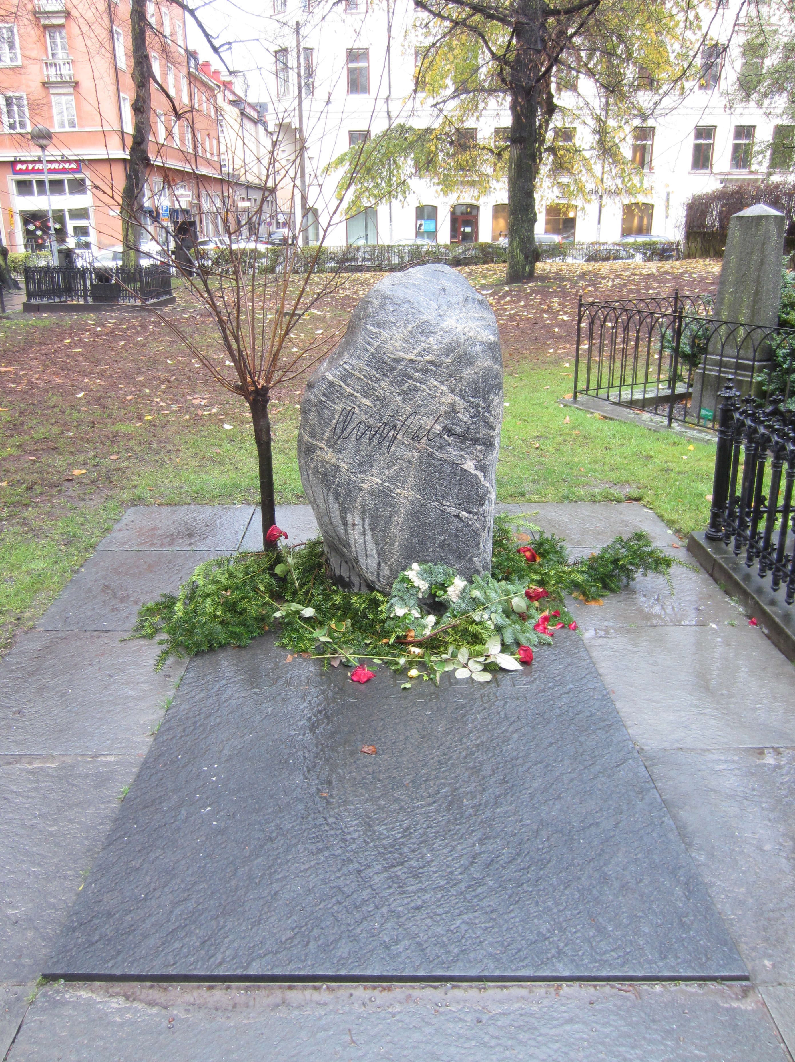 Olof Palmes grav på Adolf Fredriks kyrkogård